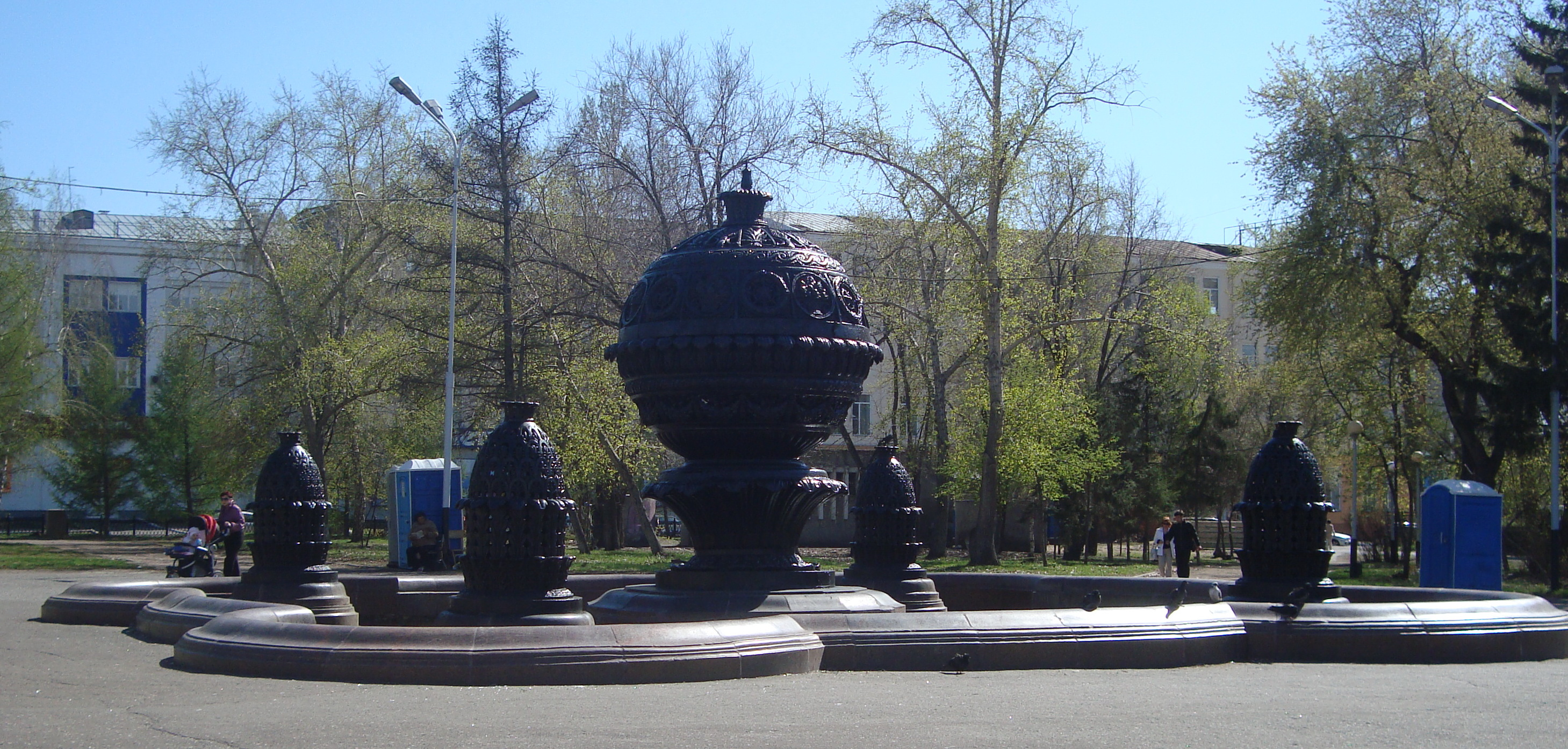 Фонтан Изобилие в городе Омске